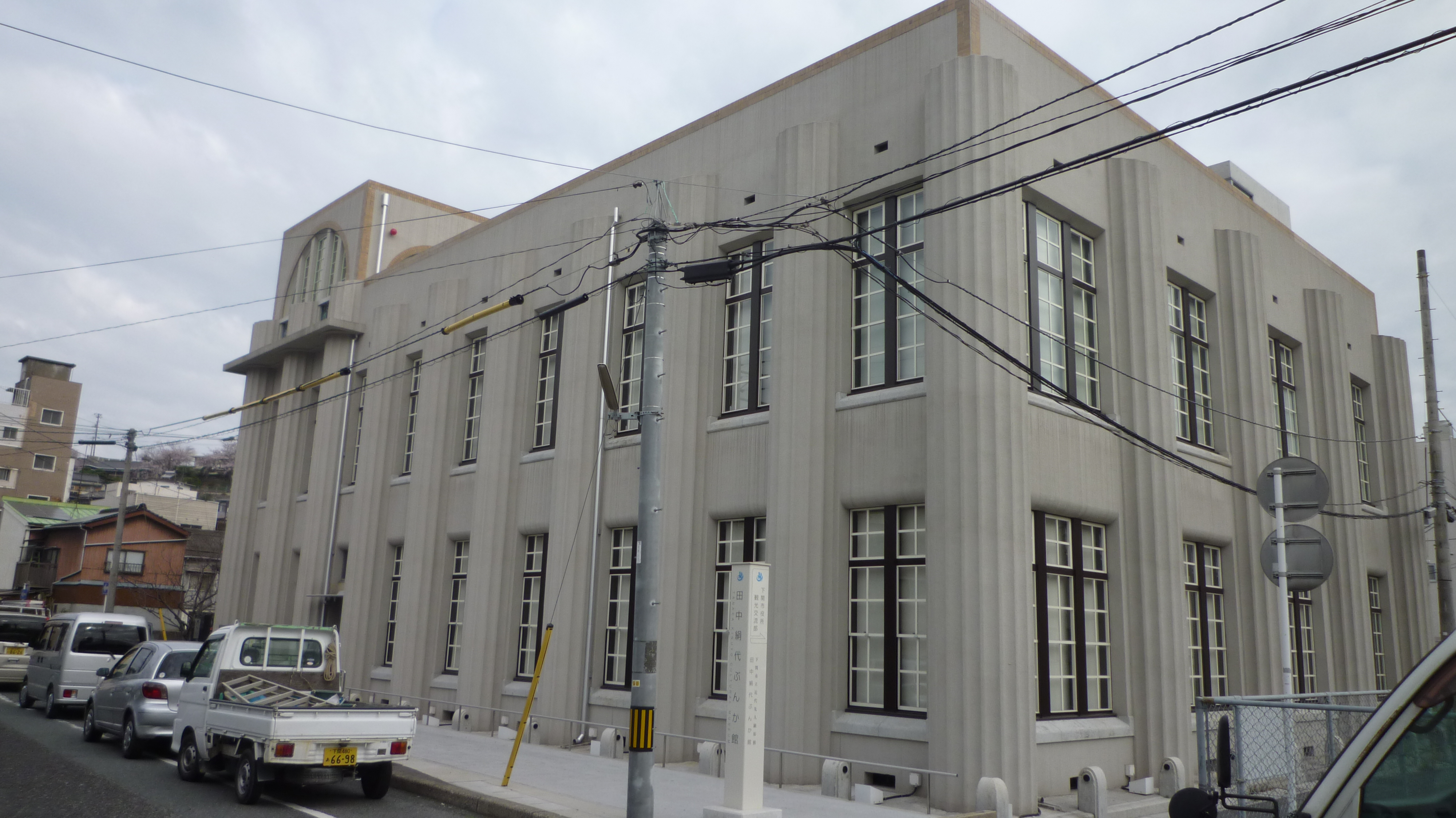 田中絹代ぶんか館